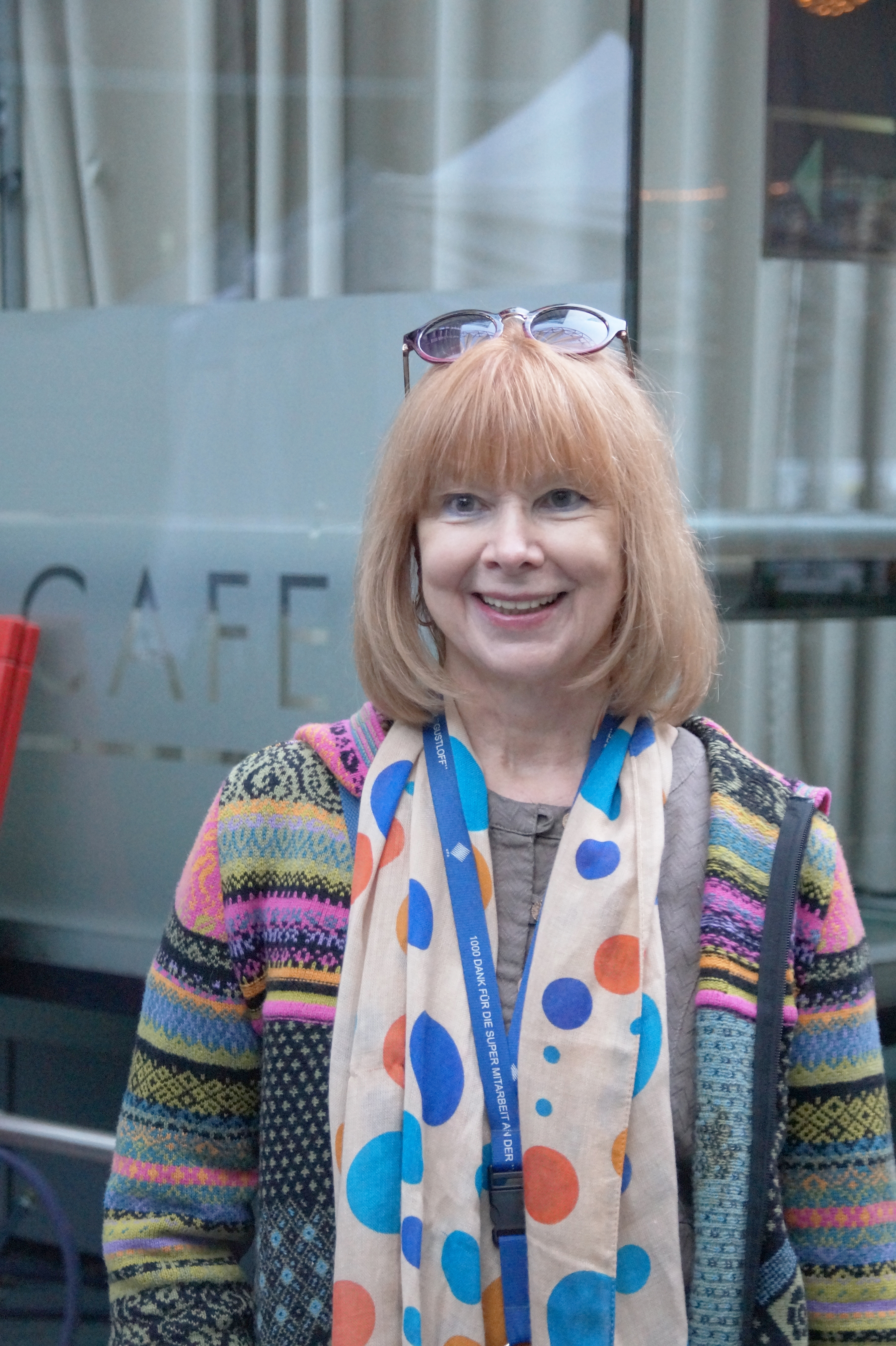 Ursula Mohn bei der Verleihung des Kurzfilmpreises "Blaue Blume", am 10.02.2016, im Sony Center Berlin.